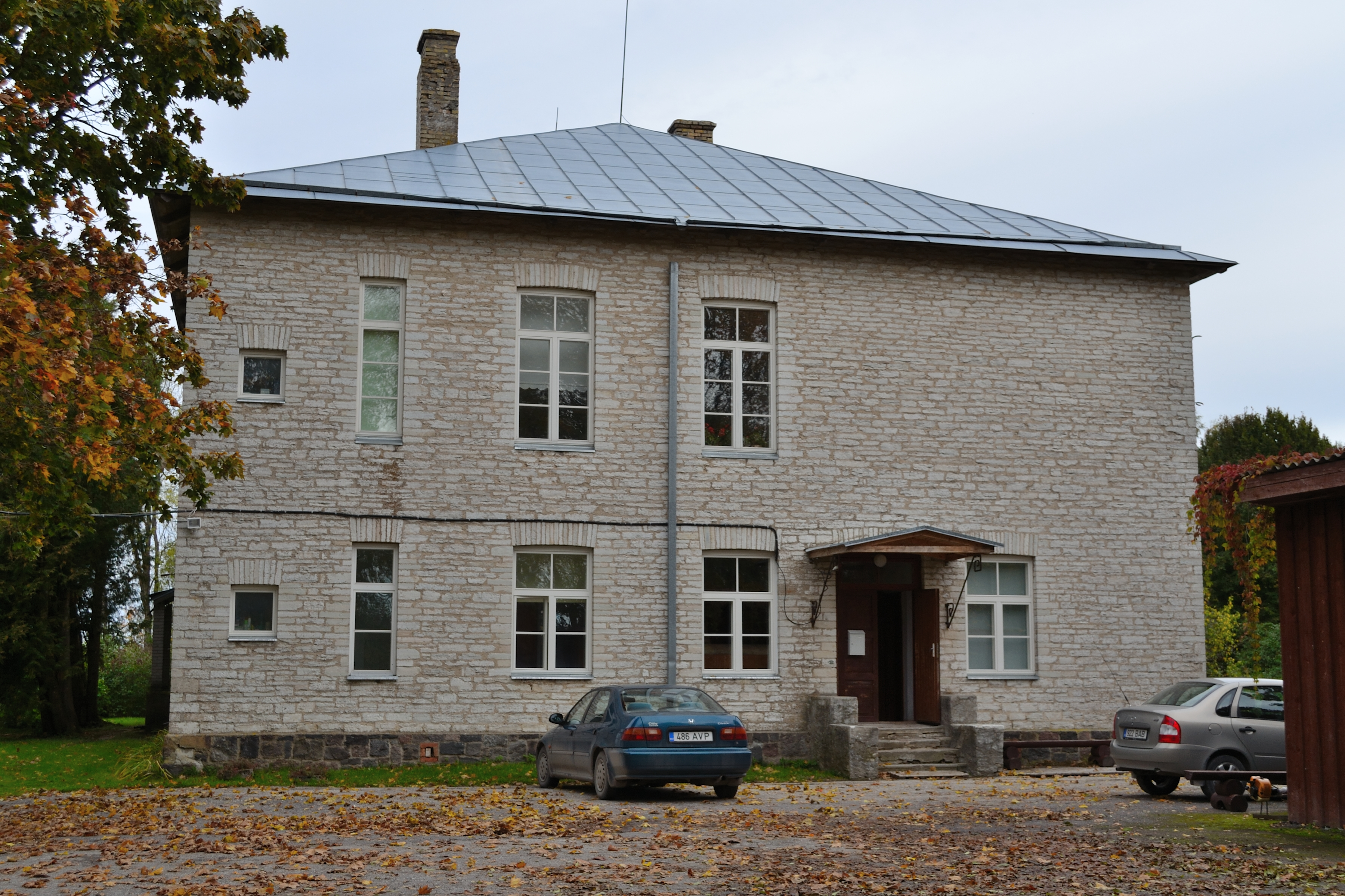 Raikküla ministeeriumikooli hoone